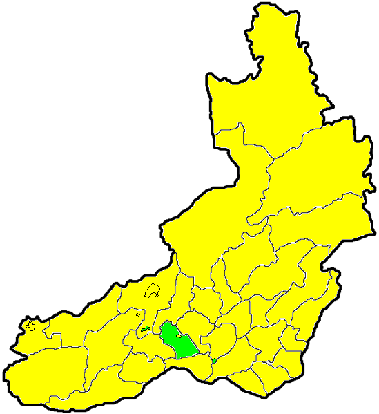 Агинский район на карте Забайкальского края